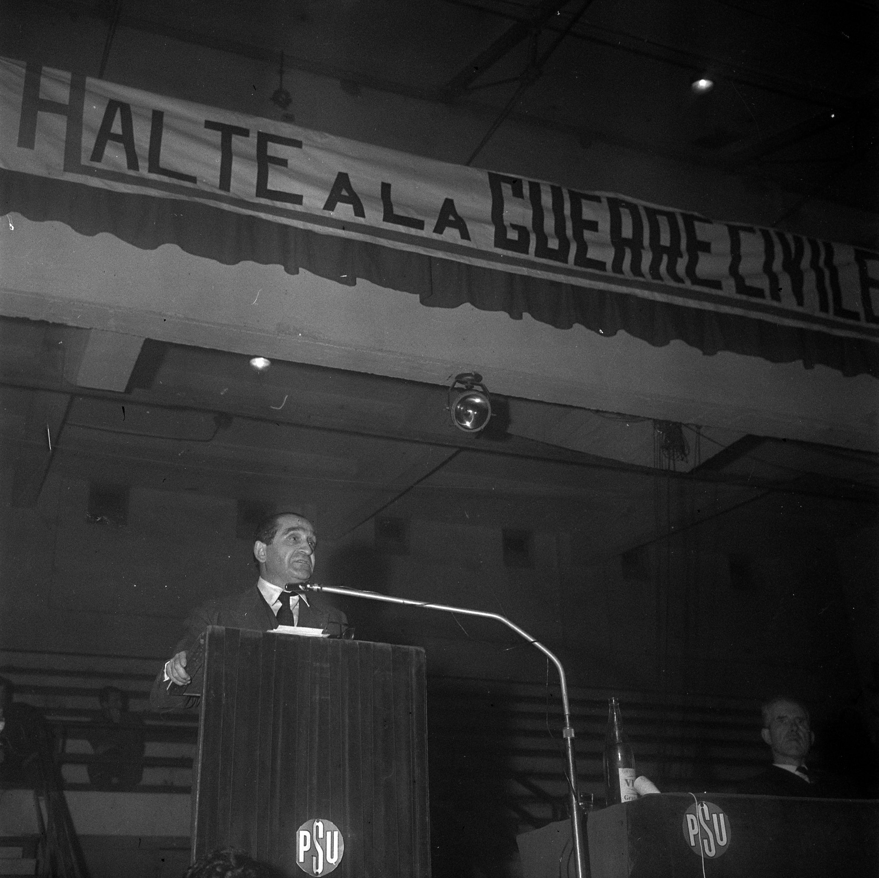 Halle aux Grains, place Dominique-Martin-Dupuy. 20 janvier 1962. Vue de Pierre Mendès France faisant un discours lors d'un meeting du Parti Socialiste Unifié (PSU) contre la guerre en Algérie en présence de Raymond Badiou.